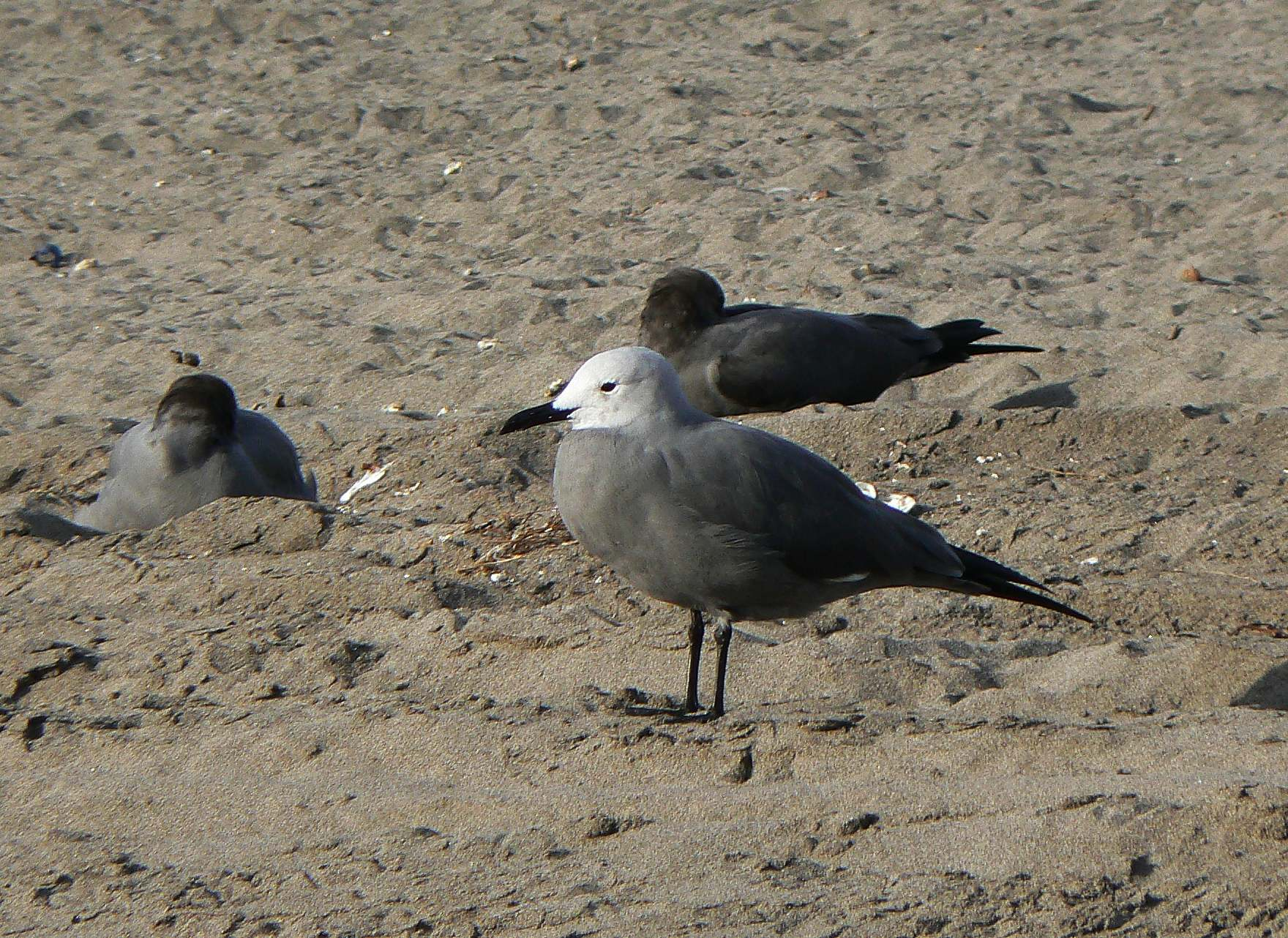 Leucophaeus modestus (Grey Gull / Goéland gris / Gaviota Garuma). La Serena, Chile.